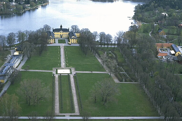 Ulriksdals slott. Motiv: Ulriksdal Nyckelord: Byggnadsminnen:Statl, Flygbilder, Riksintressen Kategori: Herrgårds-/slottslandskapUlriksdals slott.